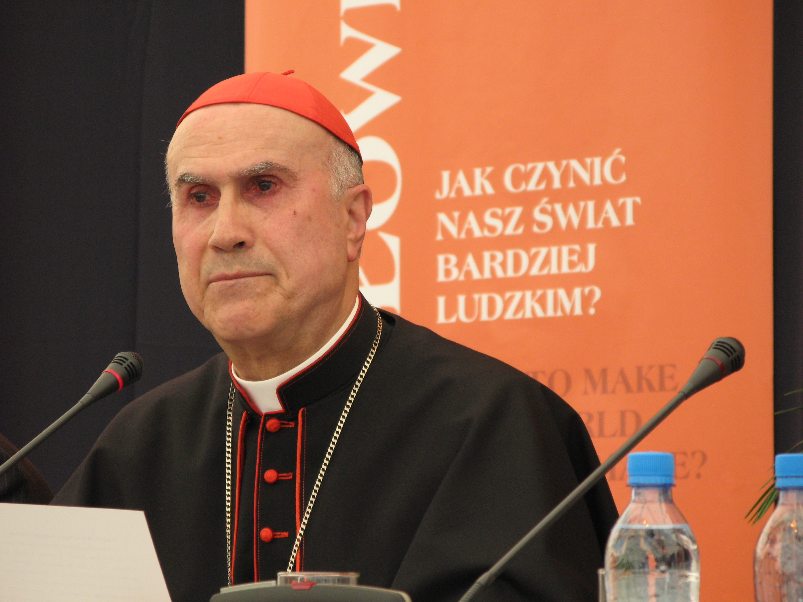 cardinal Tarcisio Bertone